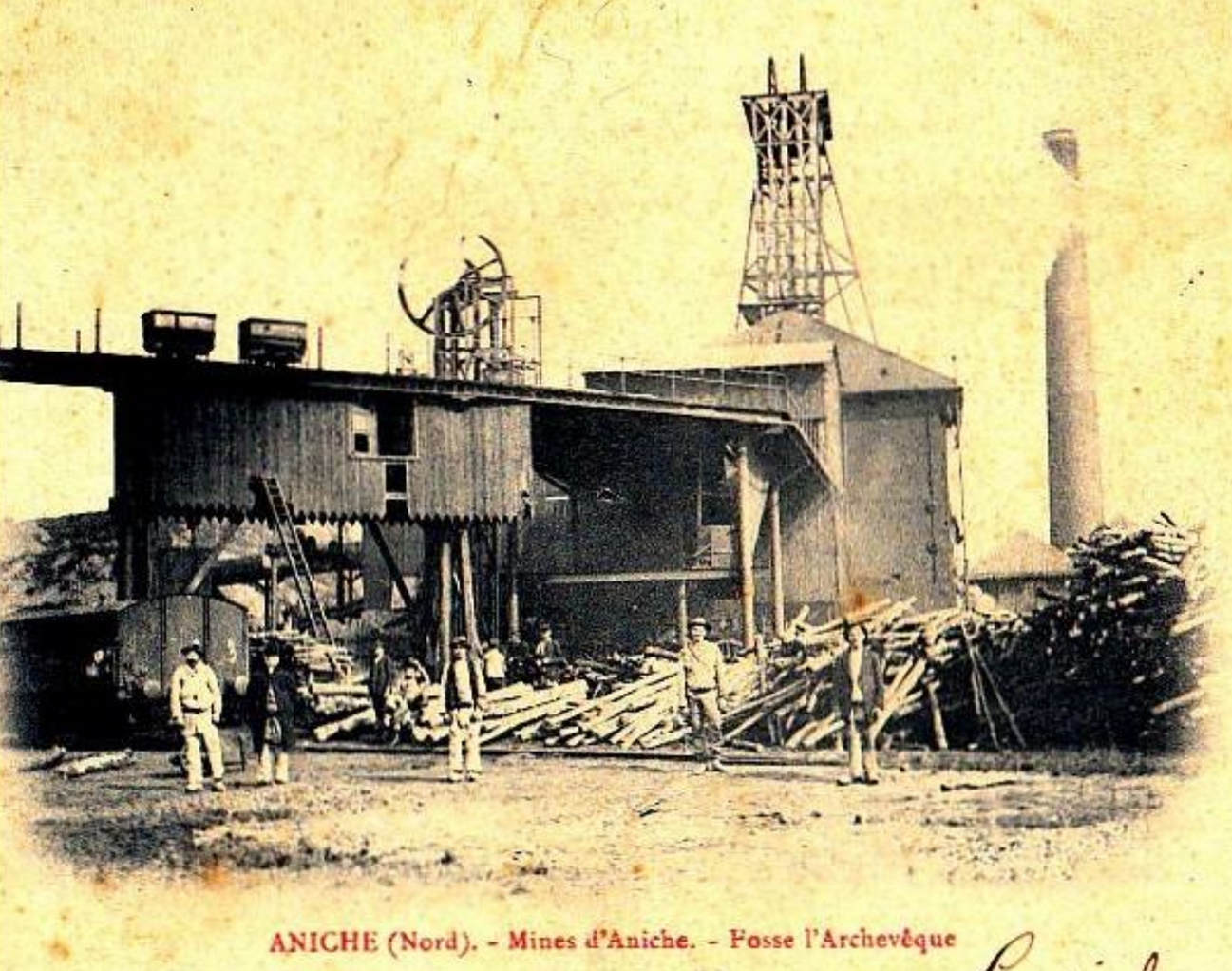 Fosse Archevêque, Aniche, Nord, Nord-Pas-de-Calais, France.